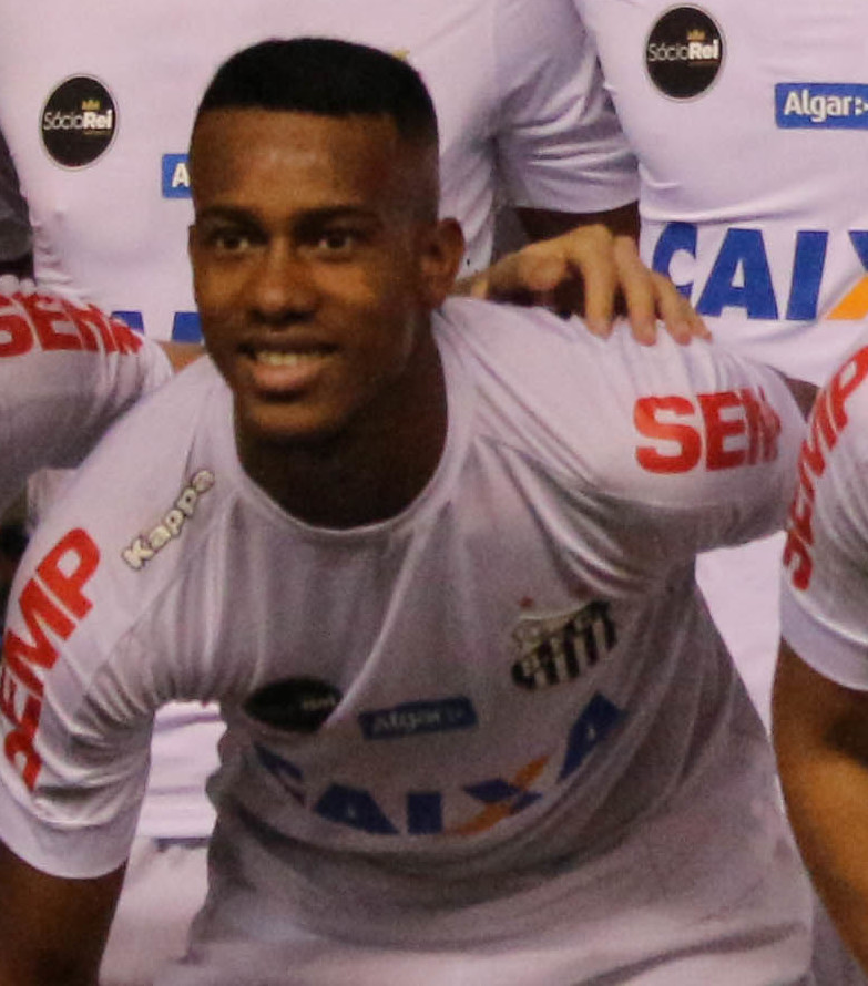 Fofo: Douglas Teixeira/Futebol Santista